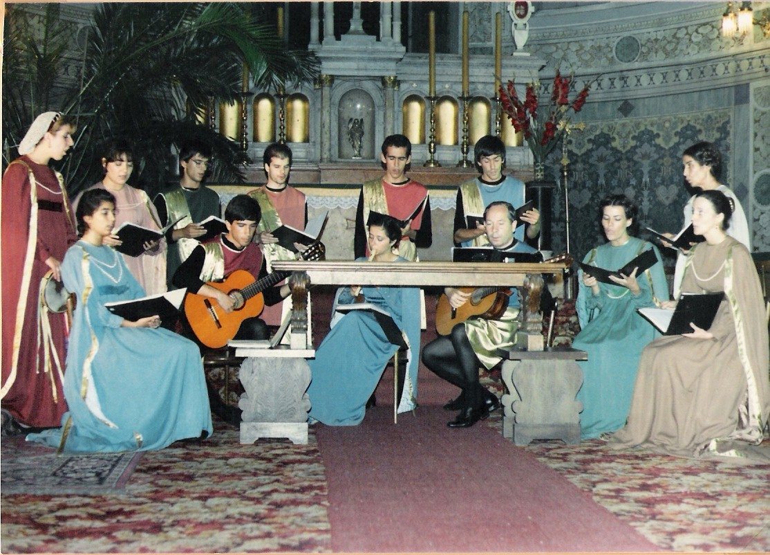 Actuação do OUP na Polónia, na Digressão de 82. Grupo de Madrigalistas fundado em 1973 pelo Maestro Mário Mateus.